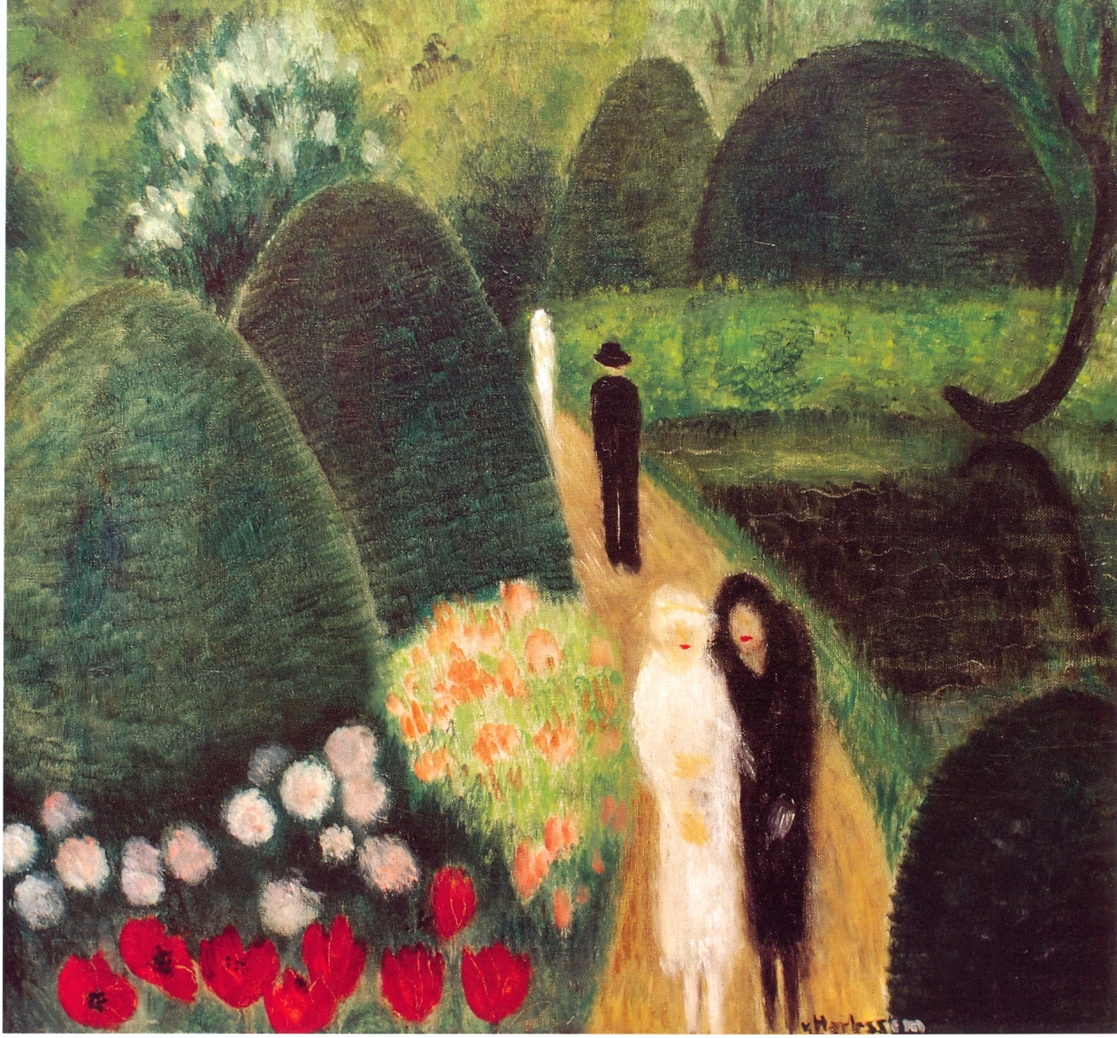 Im Tiergarten